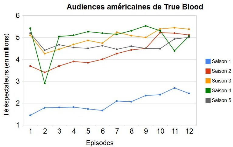 Graphique des audiences américaines des quatre premières saisons de True Blood